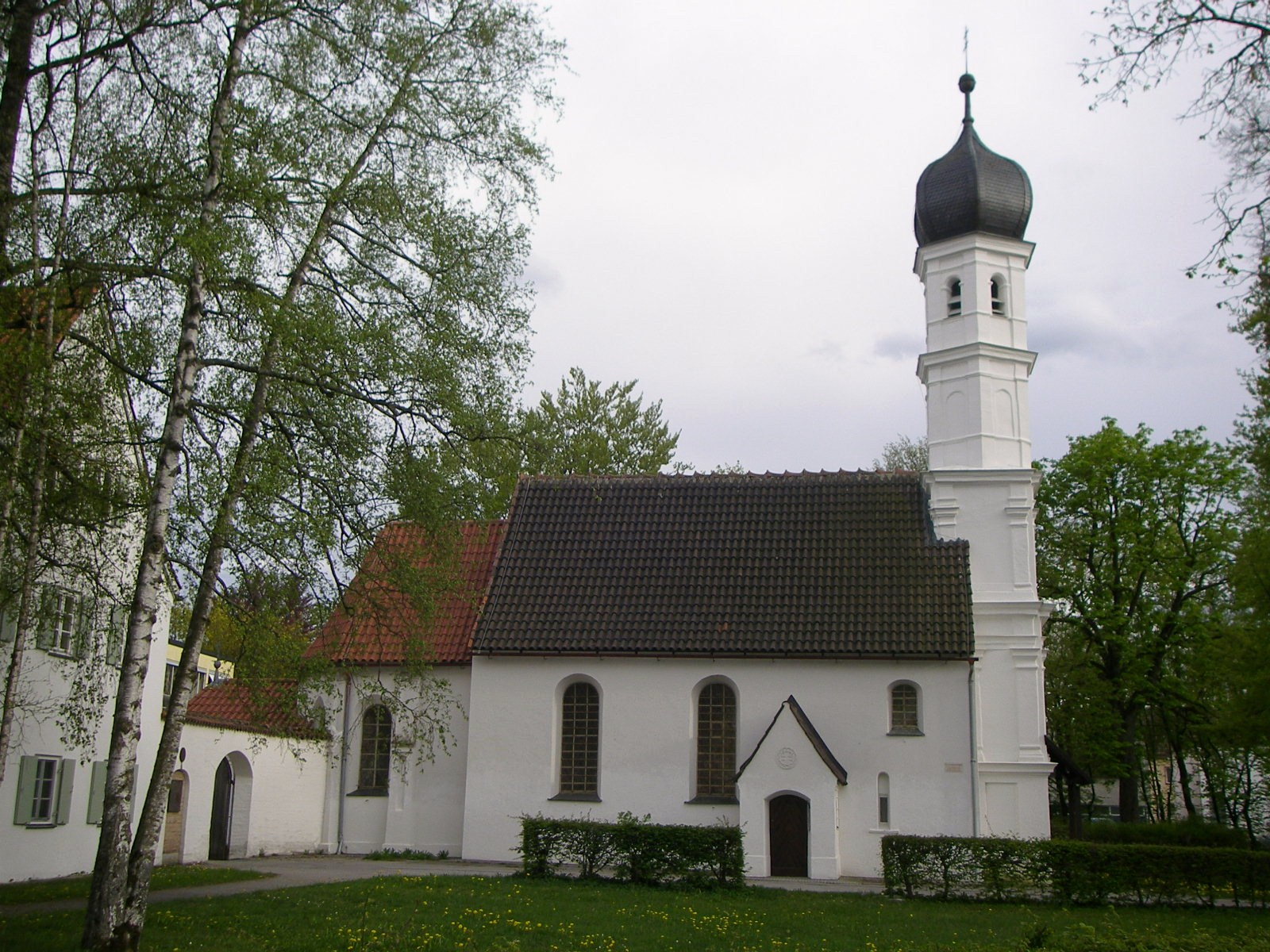 St. Dominkus, Kaufbeuren, Bavaria, Germany